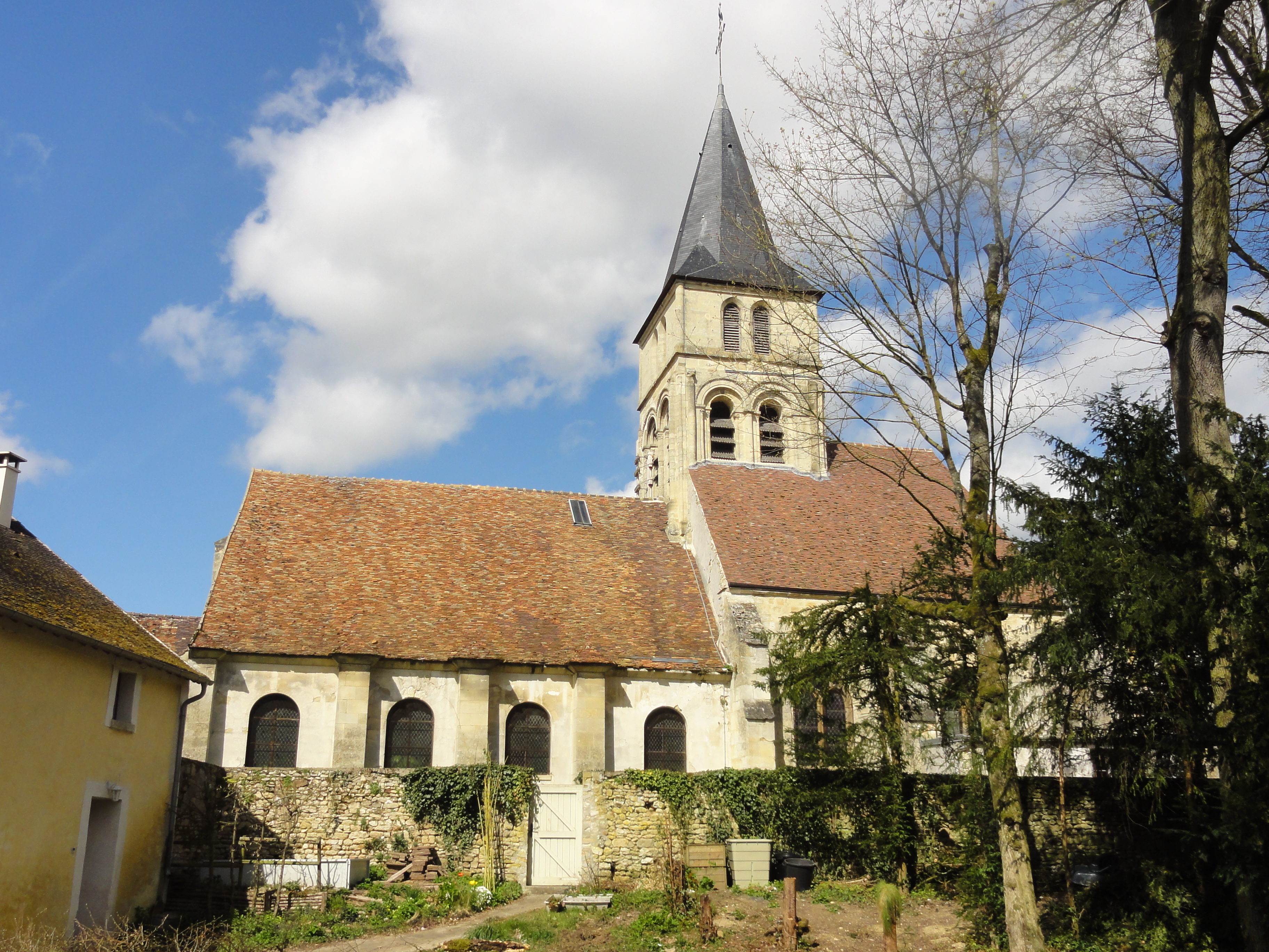 Église Notre-Dame de Théméricourt (voir titre).